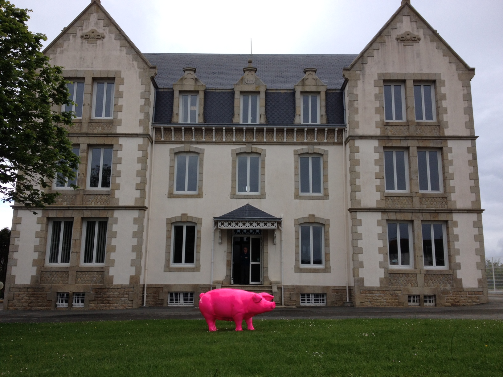 Bâtiment Ker Hastell de la société Hénaff en 2014.